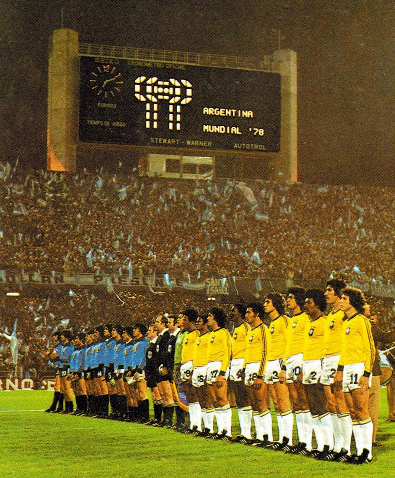 Saludo de los seleccionados de Argentina y Brasil en la previa al encuentro disputado el 18 de junio de 1978.